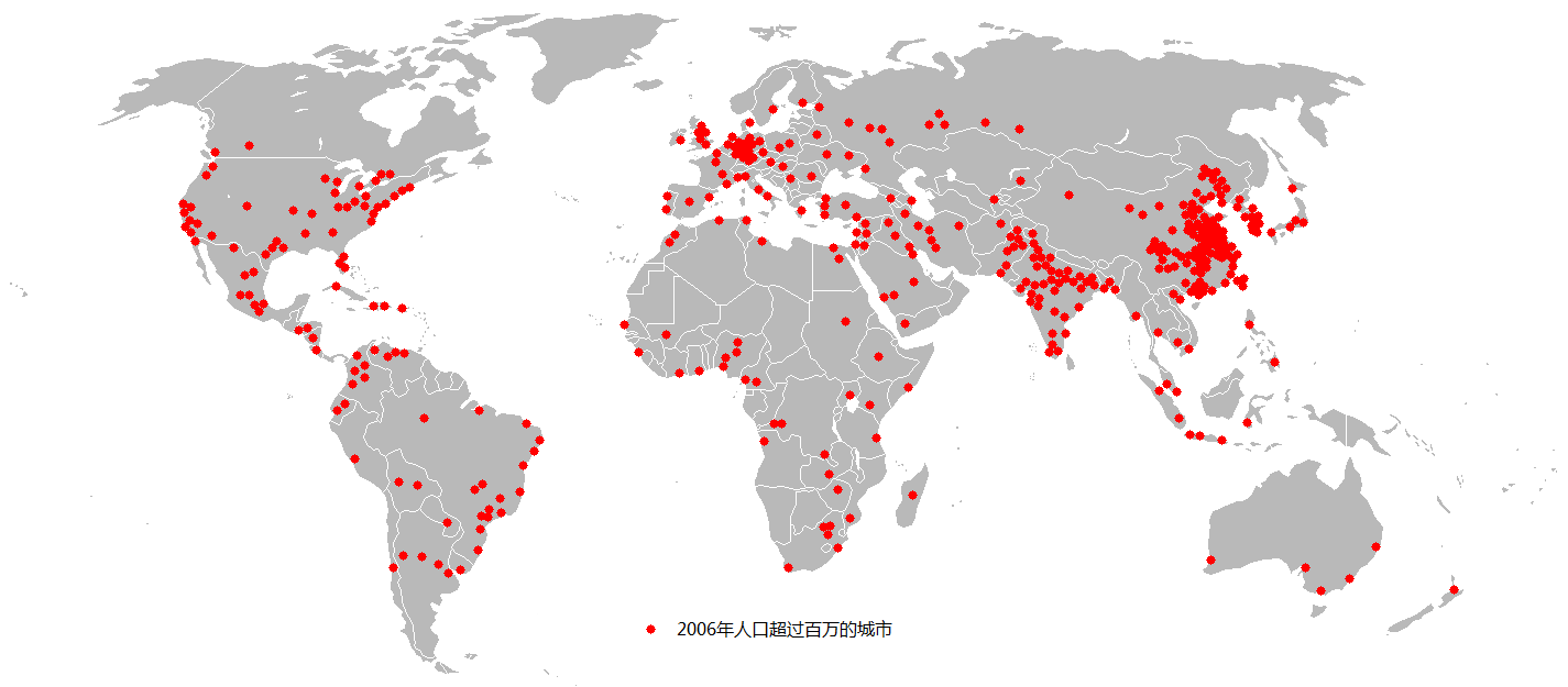 2006年时全球各城市中人口超过百万的城市分布图